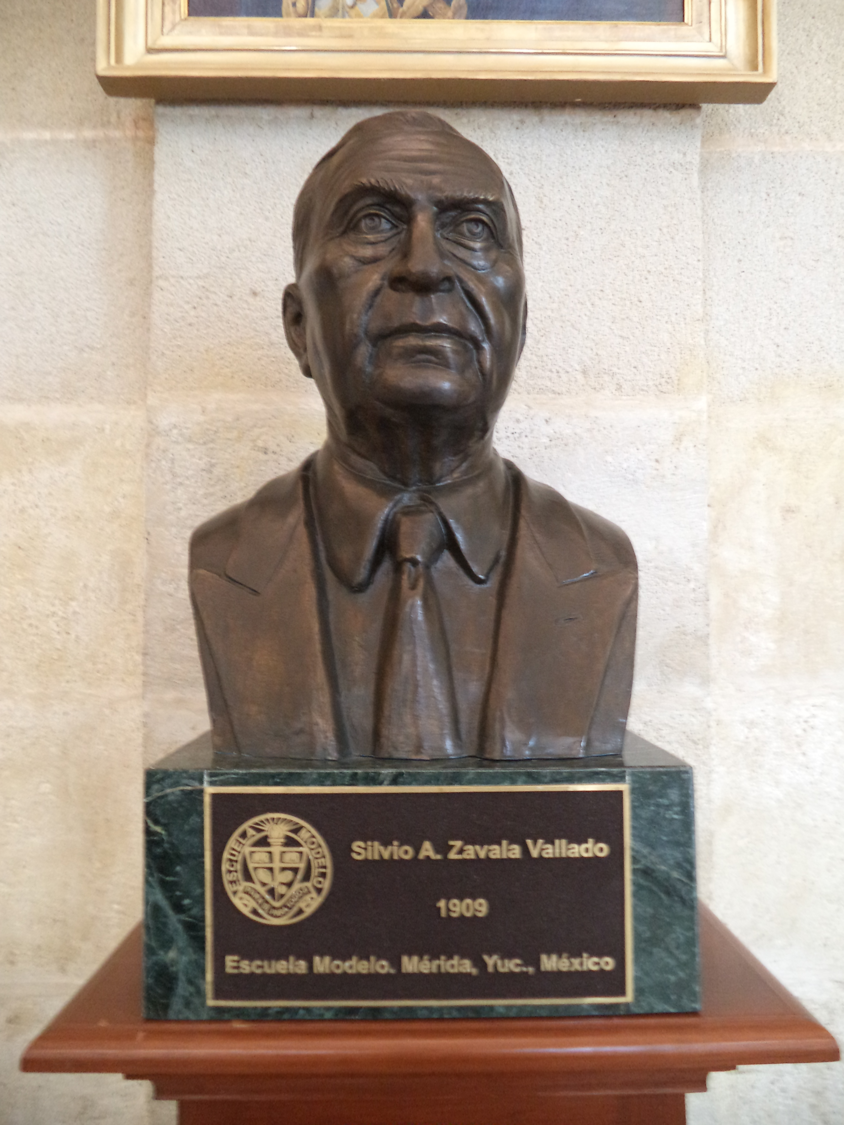 Busto de Silvio Zavala en el Archivo de Indias de Sevilla